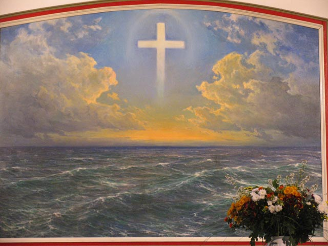 Altarbild Christus- und Garnisonkirche in Wilhelmshaven "Durchs Kreuz zum Licht!" Geschaffen vom Hamburger Seemaler H. Schnars-Alquist. Die Meeresfläche wird als diejenige der Skagerrakschlacht interpretiert - sie wurde den über 8000 deutschen und englischen Seeleute zum Grab. Das Kreuz über dem Wasser als Zeichen des Trostes und der Hilfe bestimmt auch den Titel des Bildes: Durchs Kreuz zum Licht!